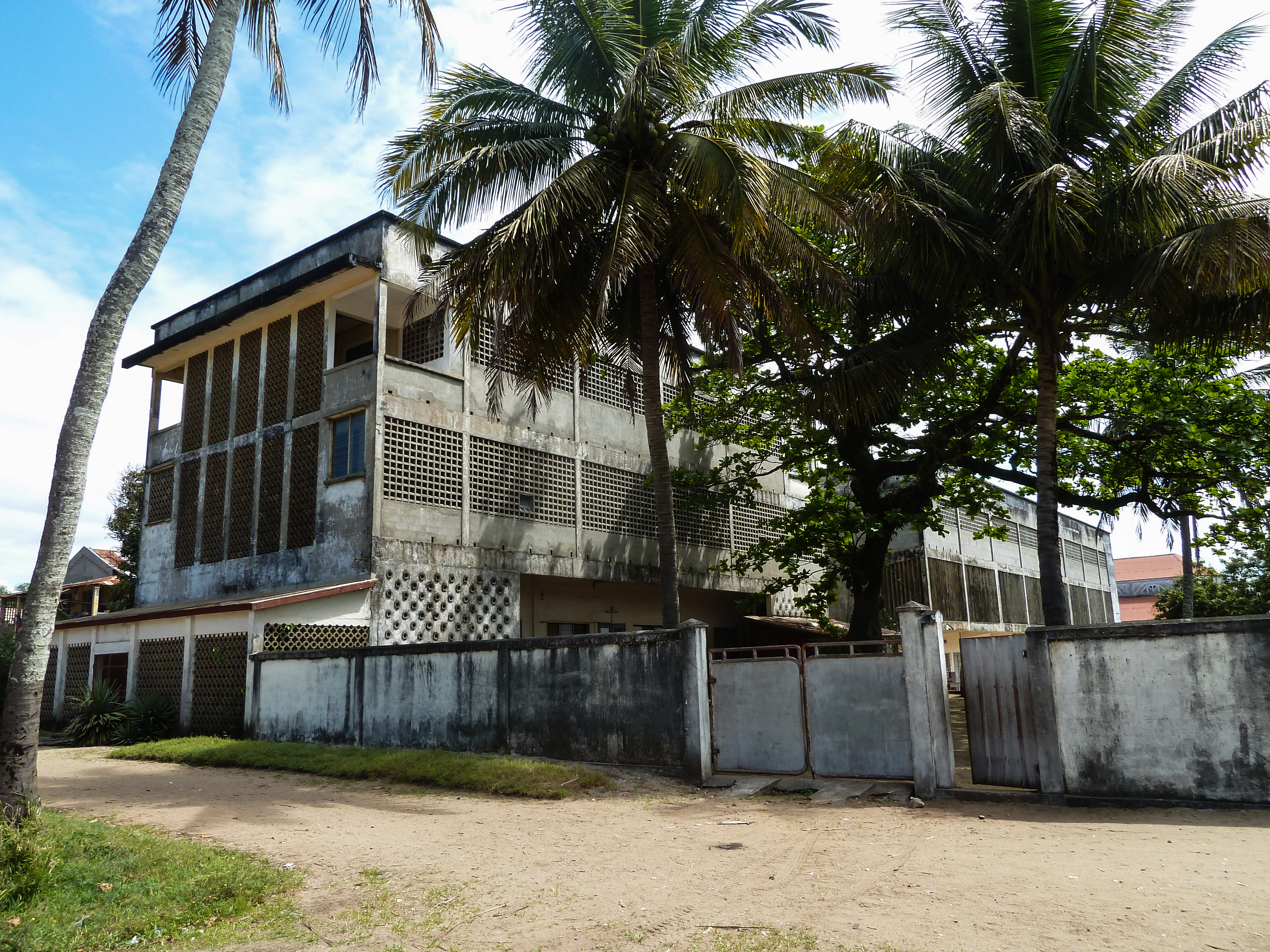 Het Collège des soeurs de St Joseph de Cluny in Mananjary